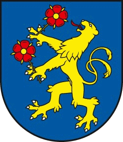 Znak slovenské obce Zemianske Podhradie. According to the Slovak Copyright Act, this image is in the public domain. (Law No. 618/2003 English translation, Part two, Section 7, Article 3b) "(3) No protection under this Act shall extend to b) any text of legislation, official decision, public document, publicly accessible register, official file, Slovak technical standards including the preparatory documentation and translations thereof, mere news of the day and speeches delivered in the course of proceedings in public affairs; however, the publication of a collection of such speeches or their inclusion into a chronicle requires the consent of the person who delivered them." Hence it is assumed that this image has been released into the public domain. However, in some instances the use of this image might be regulated by other laws.